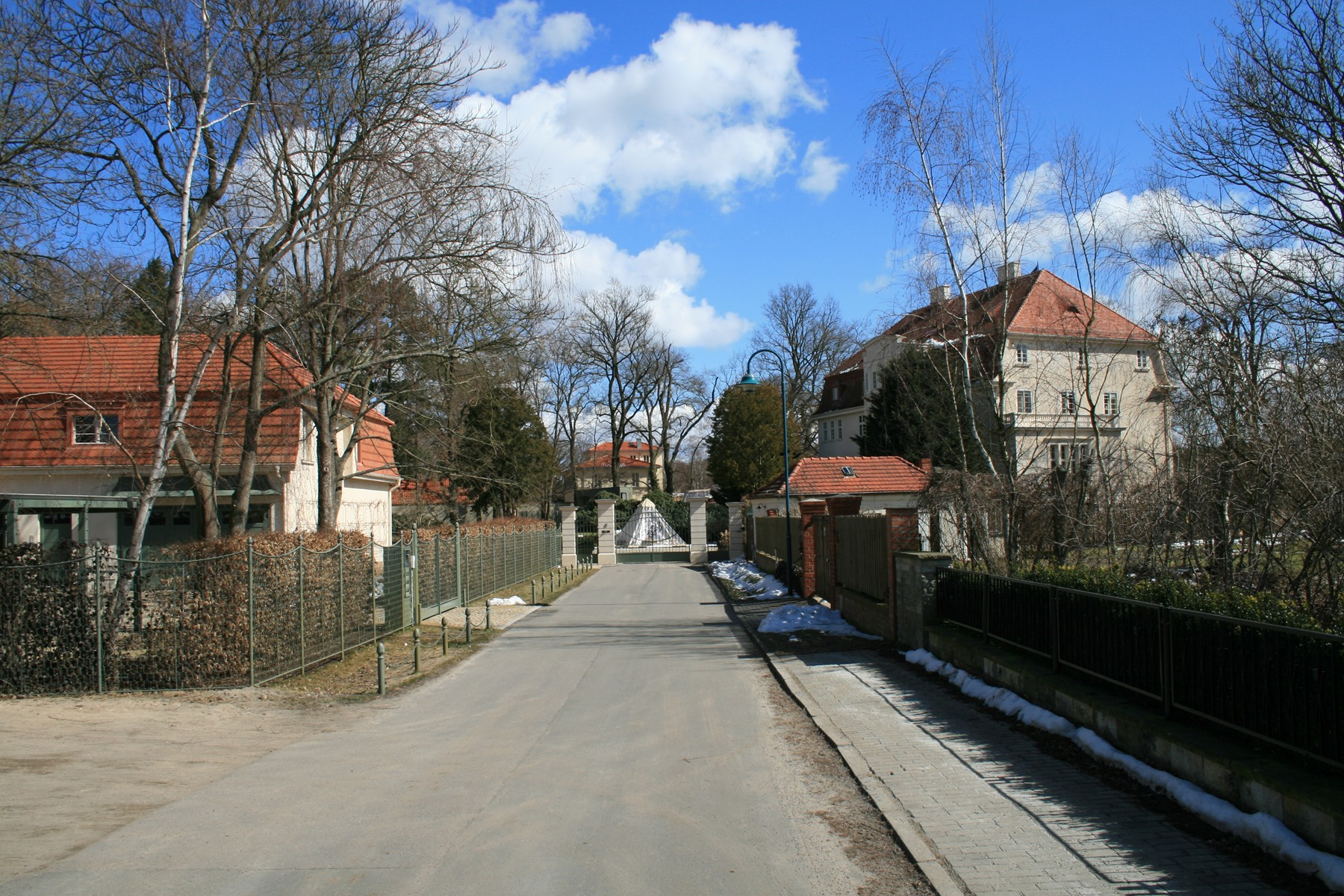 Potsdam OT Neu Fahrland, Am Lehnitzsee 8. Villa von Diringshofen mit Garten. Baudenkmal